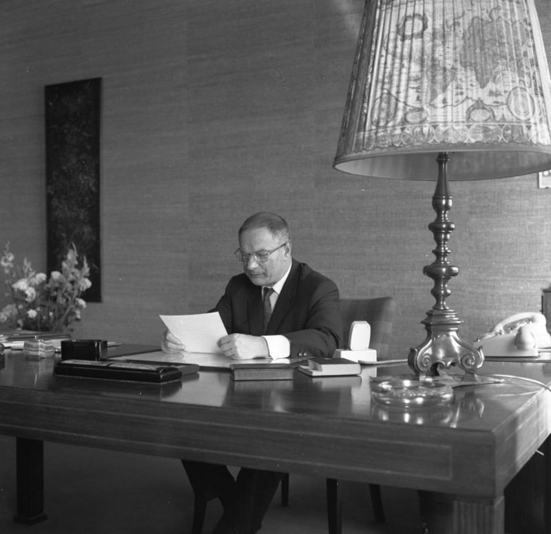 Autowerk BMW-München Direktor Hahnemann